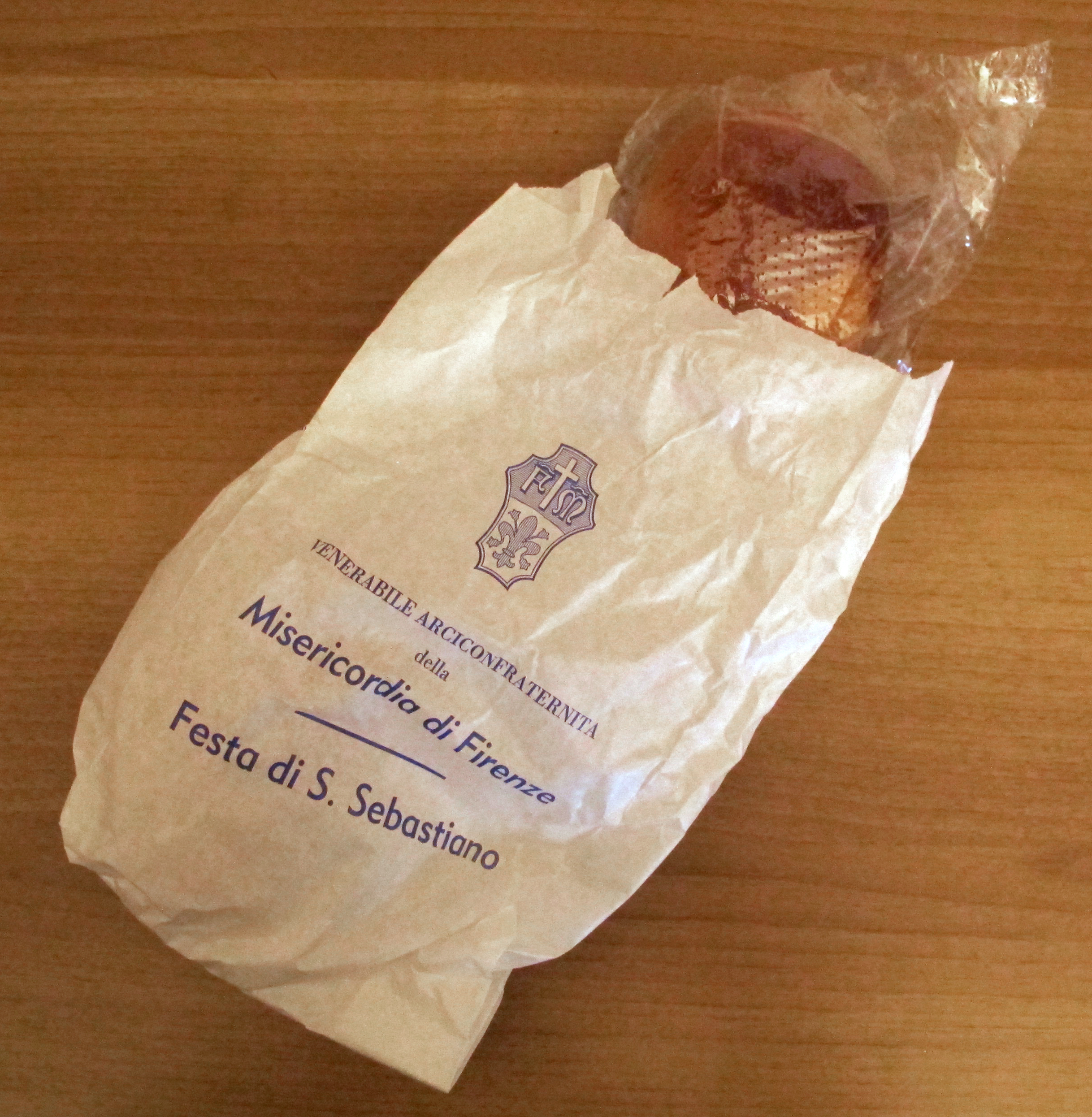 Firenze, vari siti